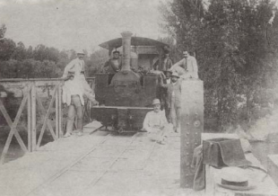 Locomotora ALCAÑICES, sobre el puente del río Genil, ca. 1890 (fondo Agraft)